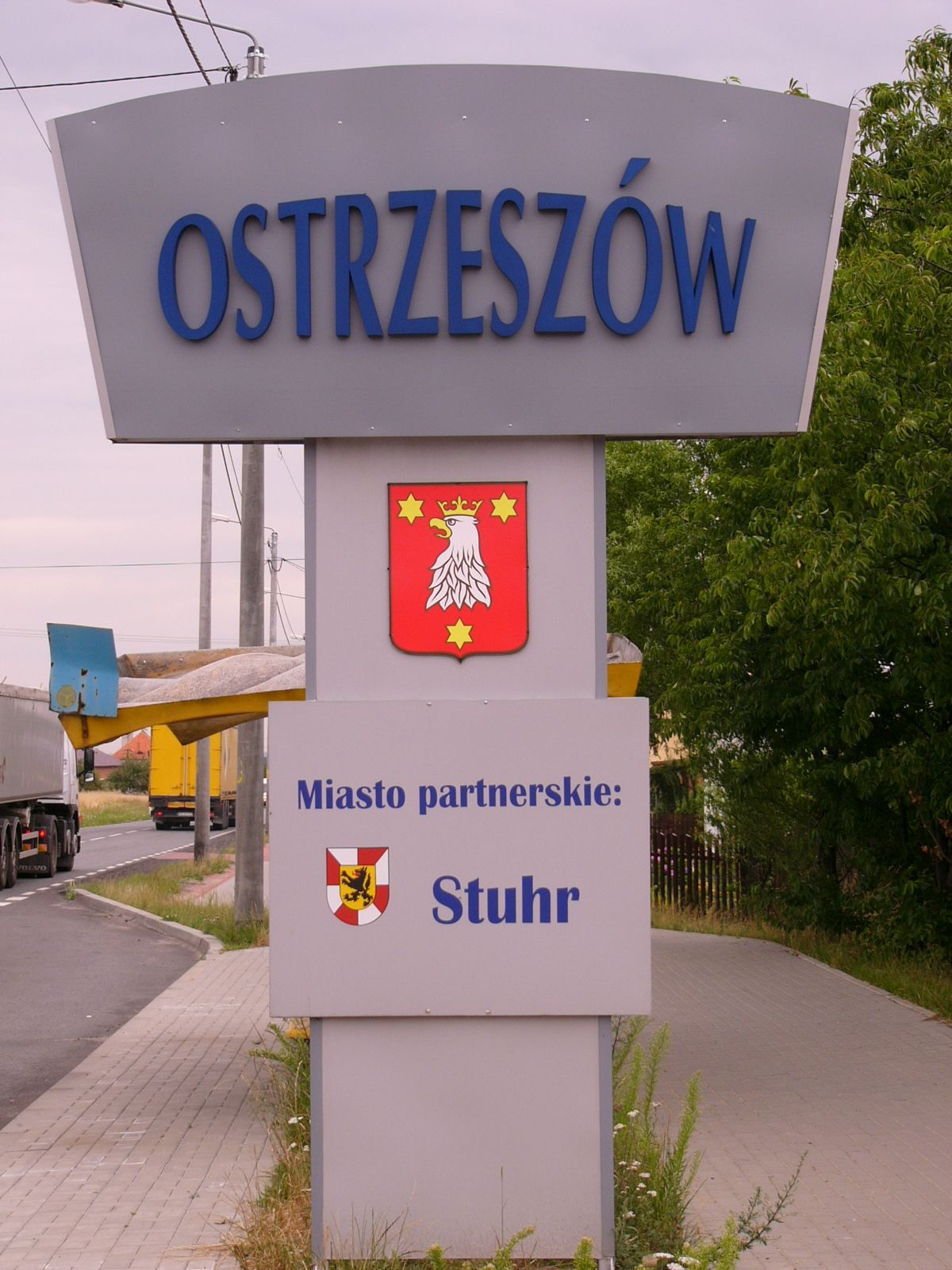 Znak przy wjeździe do Ostrzeszowa